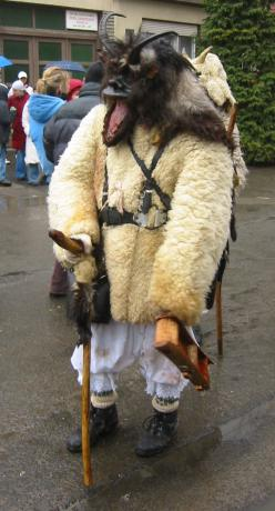 Mohács, Busójárás. Saját kép, Fülöp István, Mohács, 2006. február 26. Az eredeti képen a busó jobbra néz, de tükröztem. Kezében hímvesszőt formázó bot.